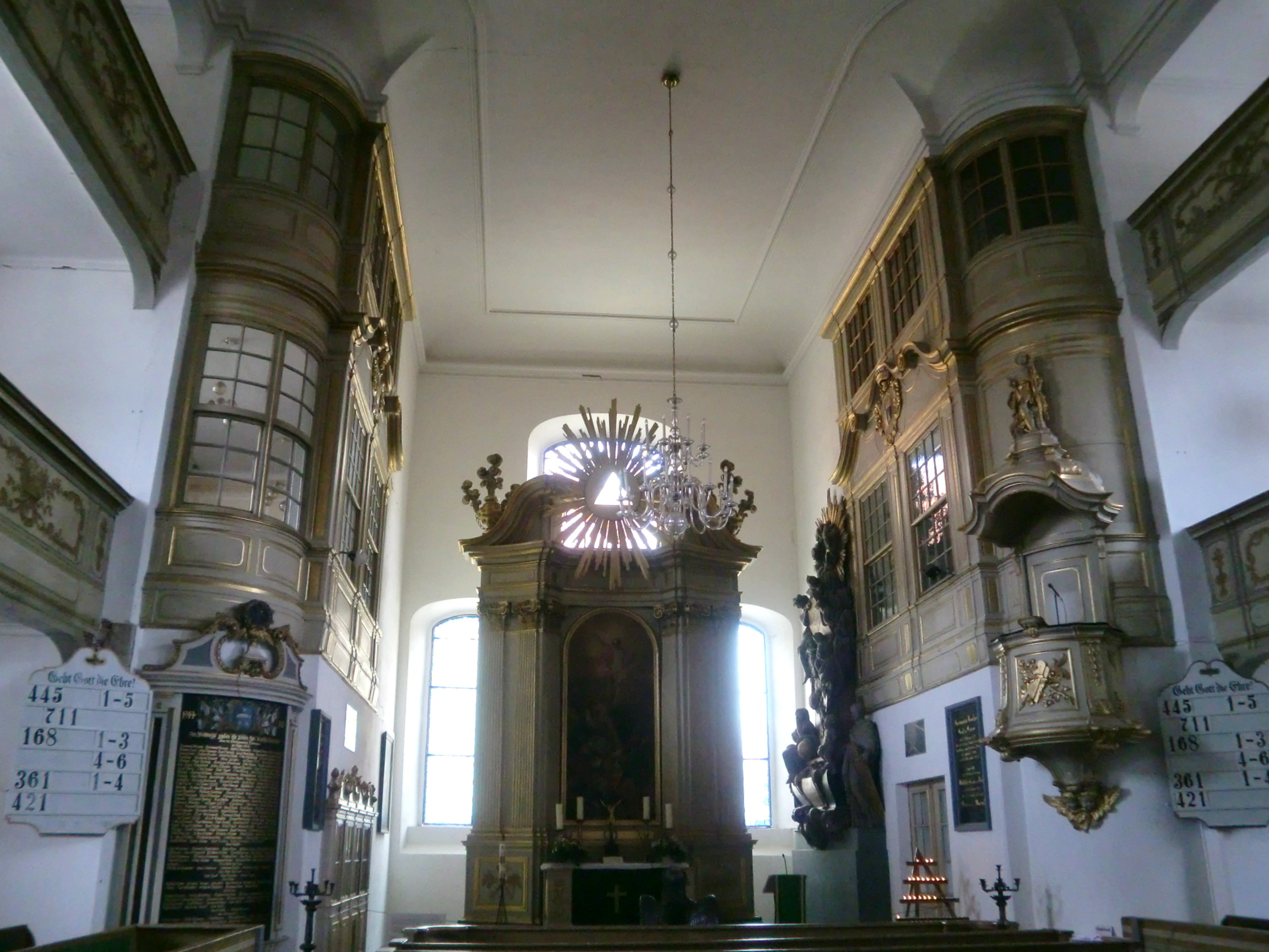 Sankt-Nikolai-Kirche Lübbenau, Blick zum Altar